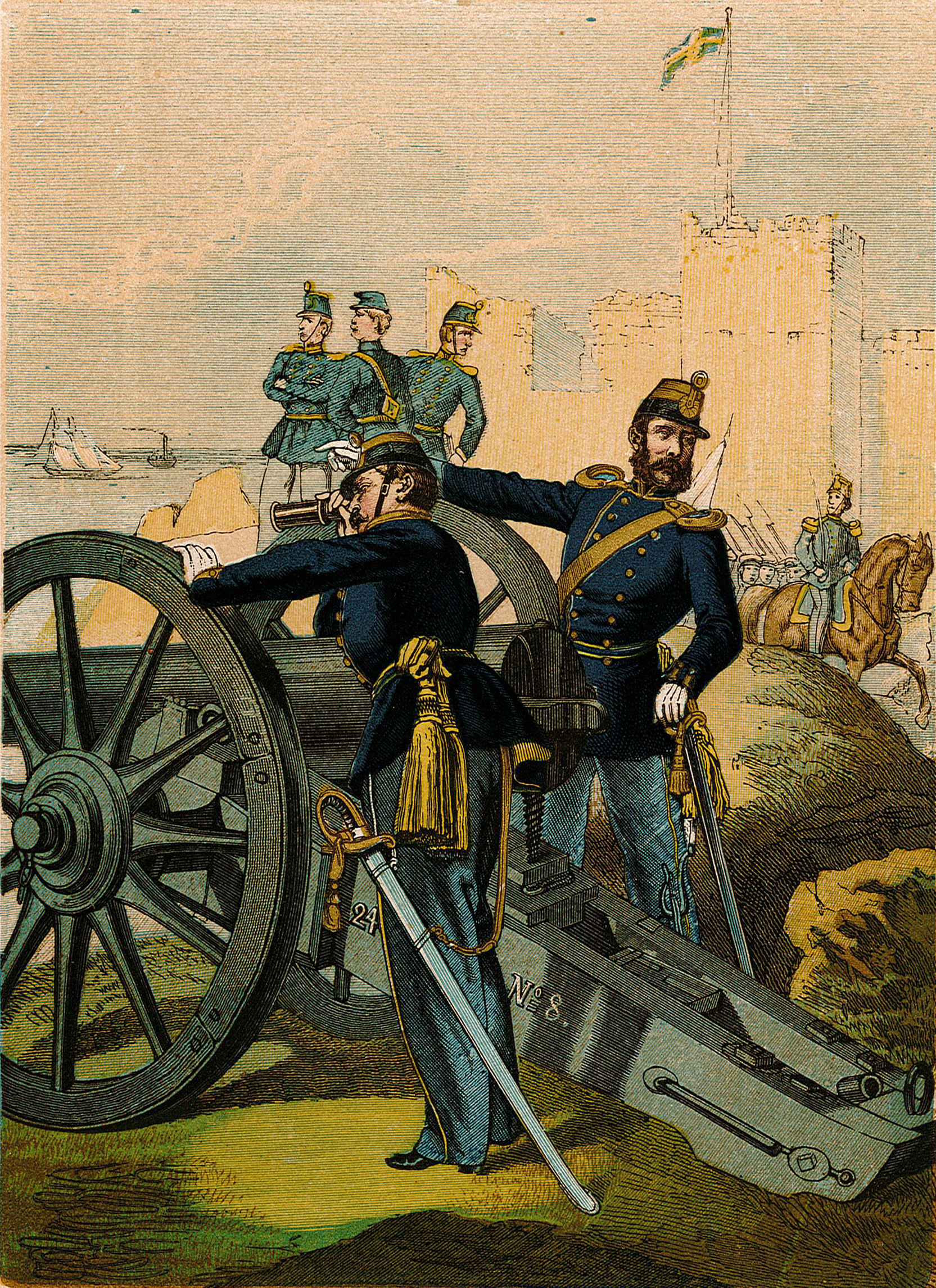 Uniformer för ”Gotlands National-Beväring.”